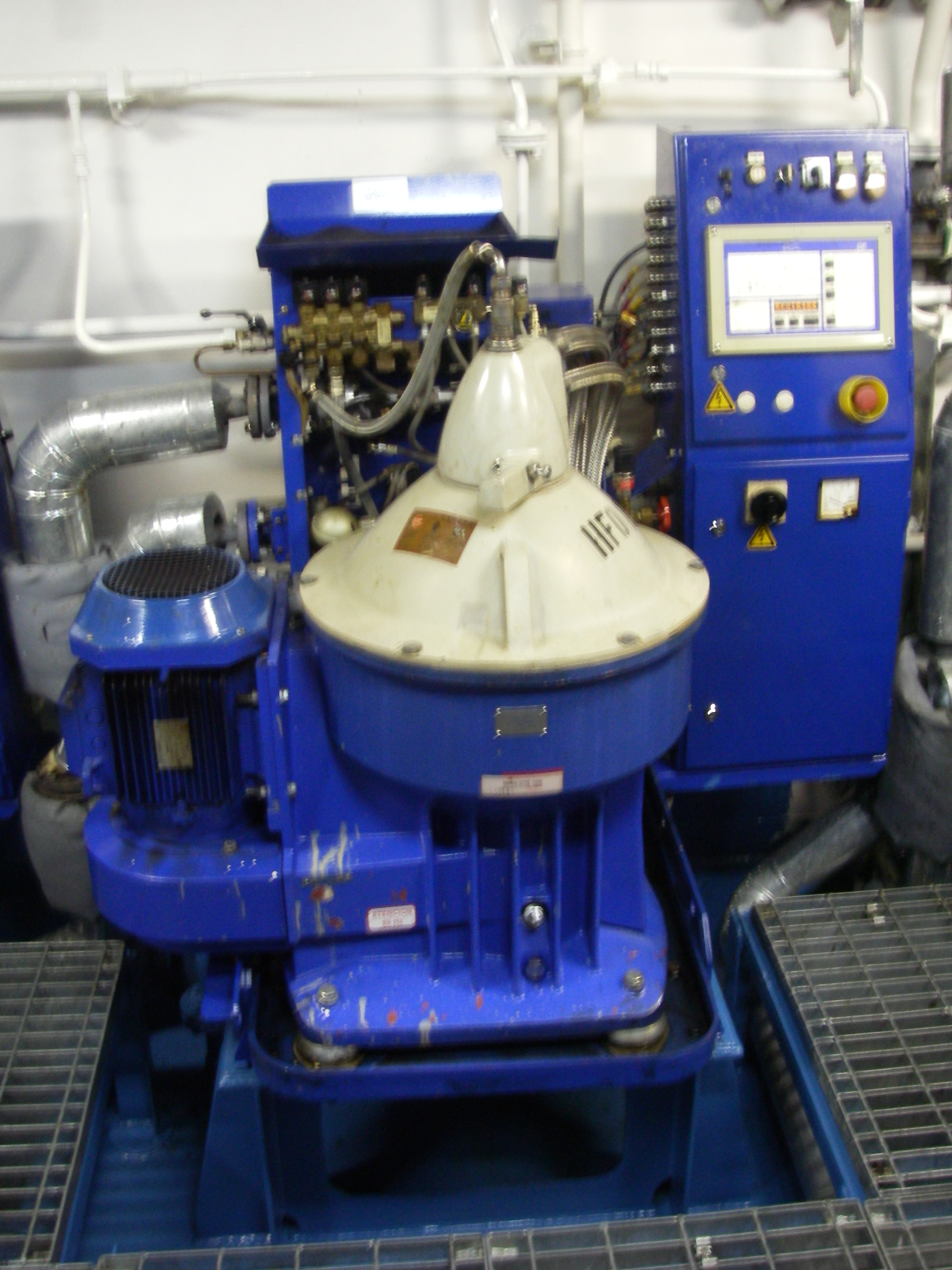 An Alfa Laval fuel oil purifier